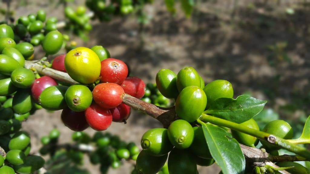 Tambla, Lempira